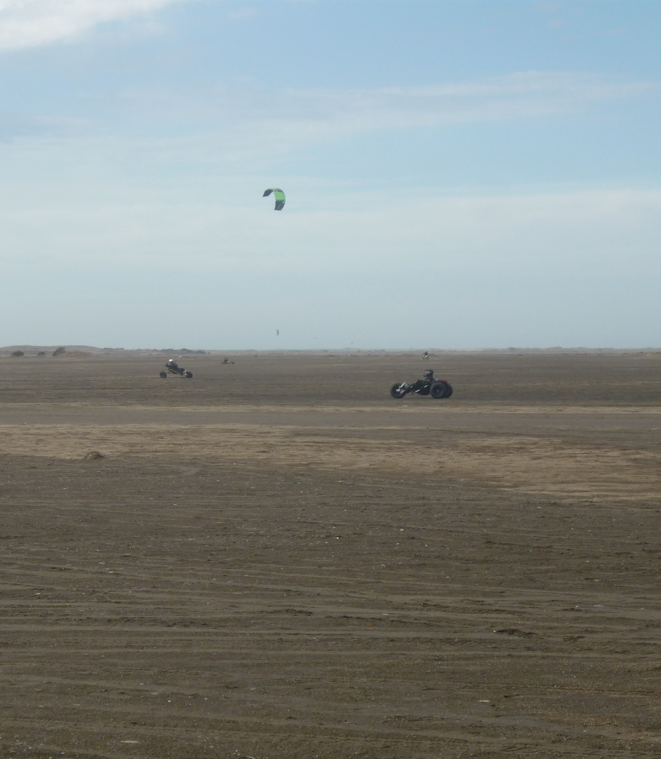 Carrovelismo en el Balneario El Condor, Argentina.